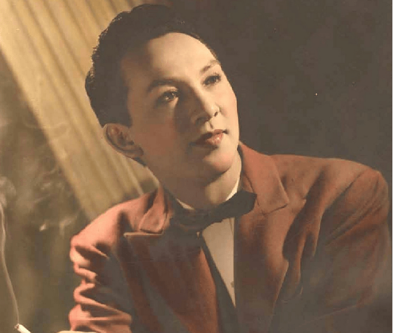 Jack Mei Ling